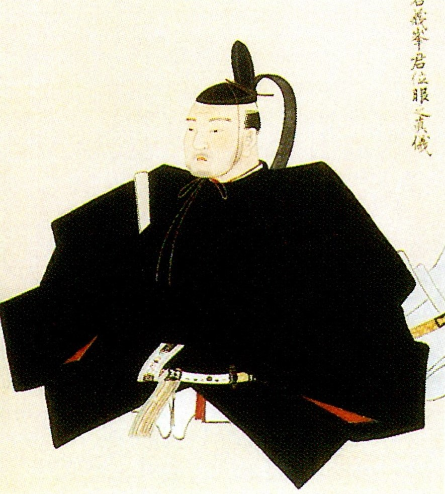 佐竹義峯の肖像。